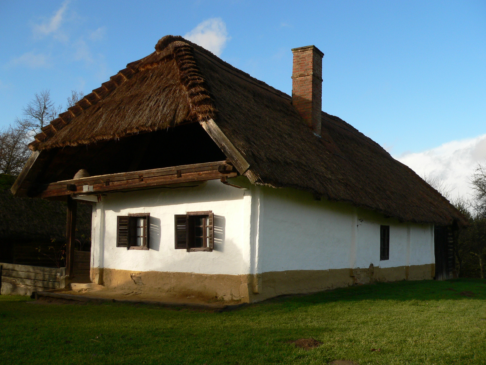 Lakóház (Szalafő, Pityerszer 9.) This is a photo of a monument in Hungary, Identifier: 12934